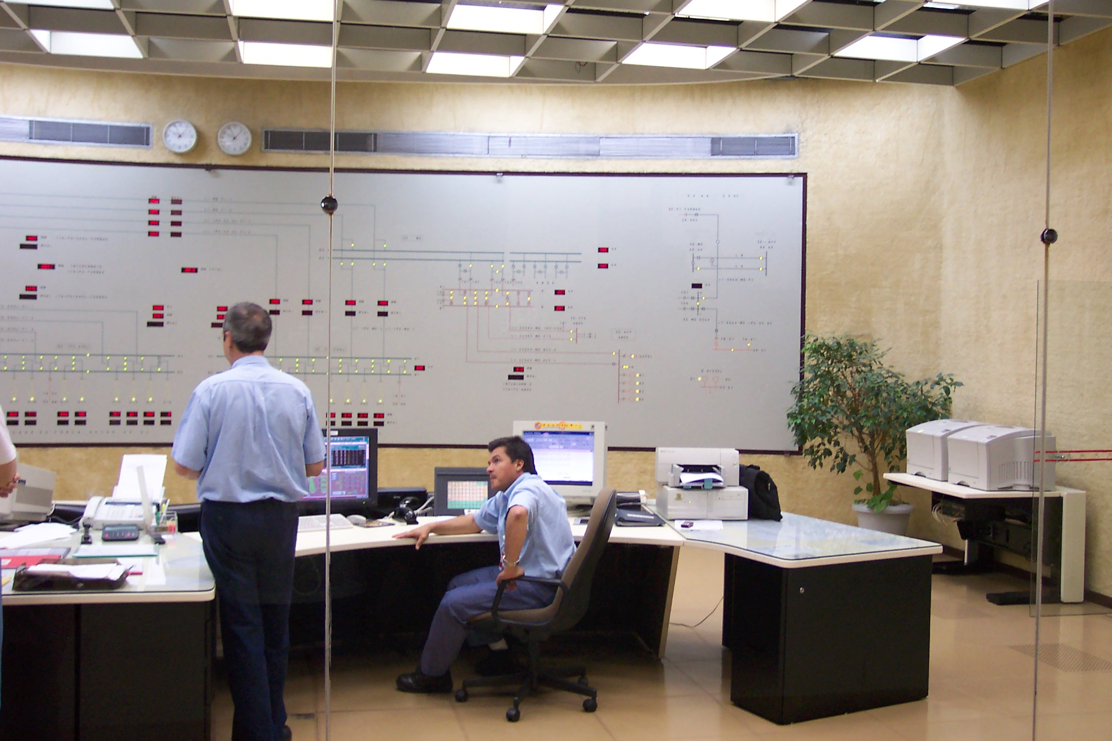 Itaipu Binacional-Central